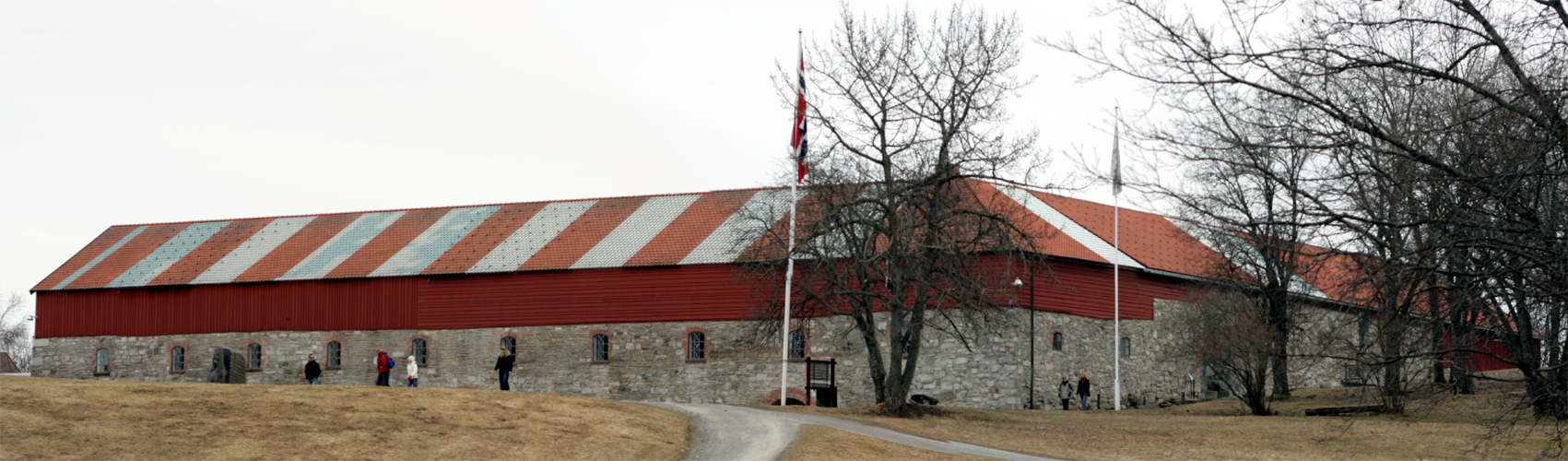 Storhamarlåven.